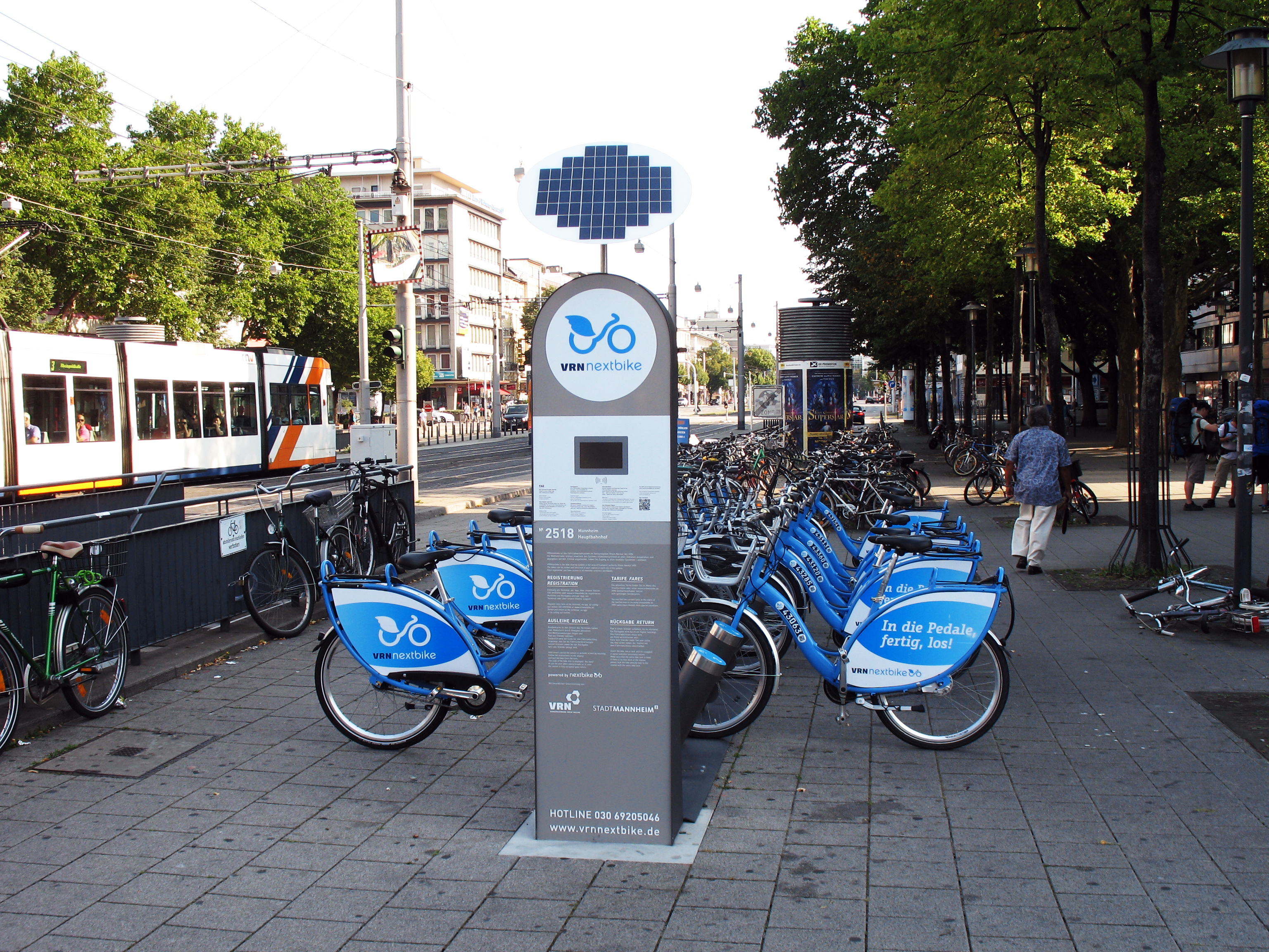 VRN-Nextbike Verleihstation Mannheim Hauptbahnhof